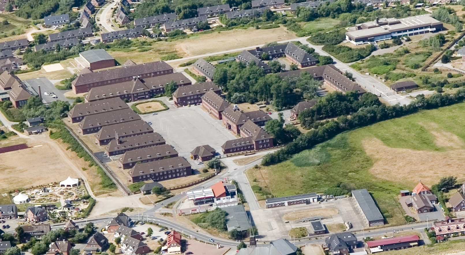 Luftaufnahme der (ehemaligen) Marineversorgungsschule in List auf Sylt.